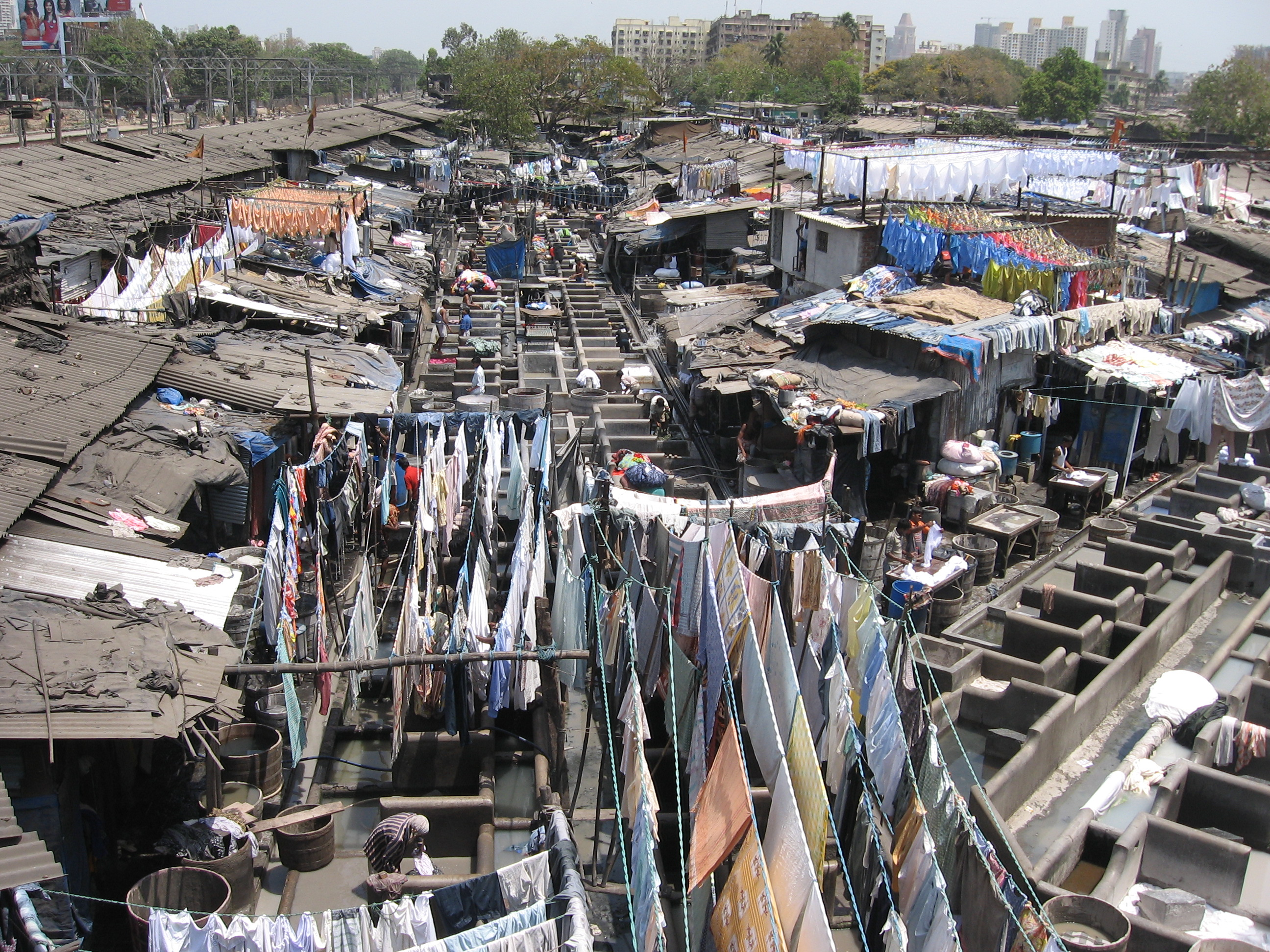 Dhobi Ghat at Mahalaxmi in Mumbai